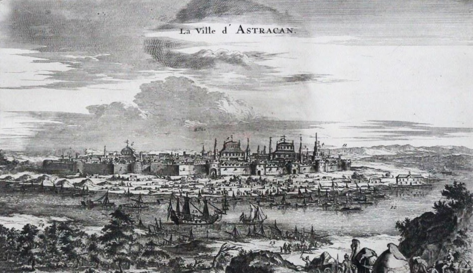 Coenraad Decker. La Ville d'Astracan